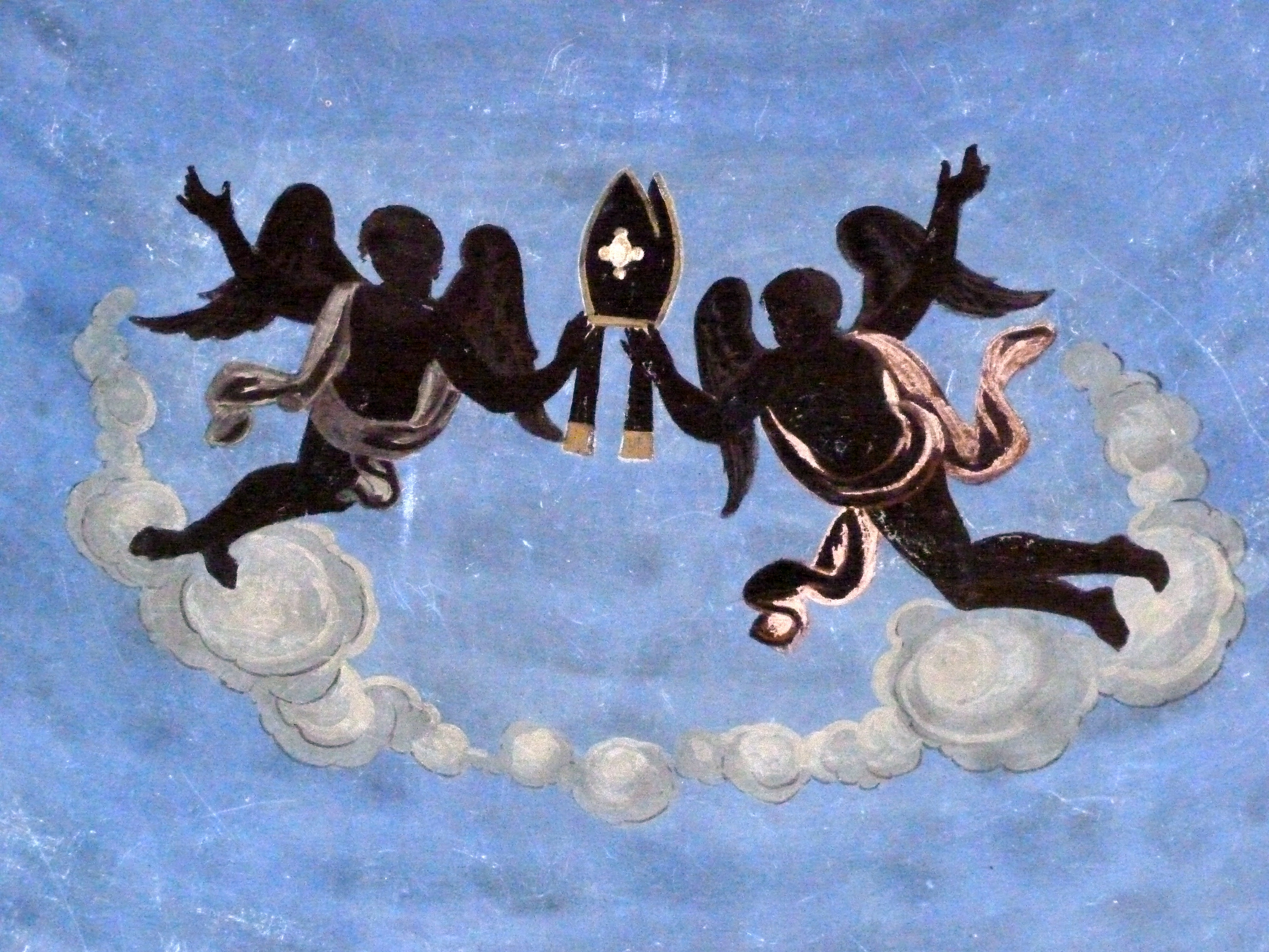 Detall del mural de l'absis de Sant Martí de Corsavell